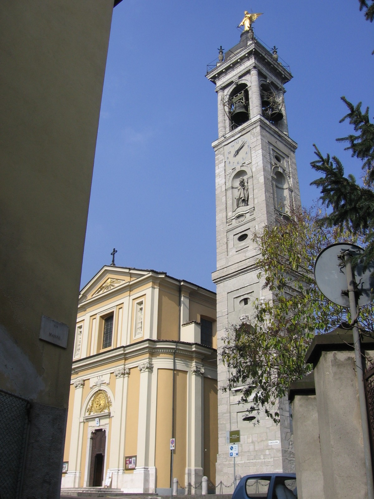 Santuario della Madonna della gamba, Desenzano di Albino, Bergamo, Italy